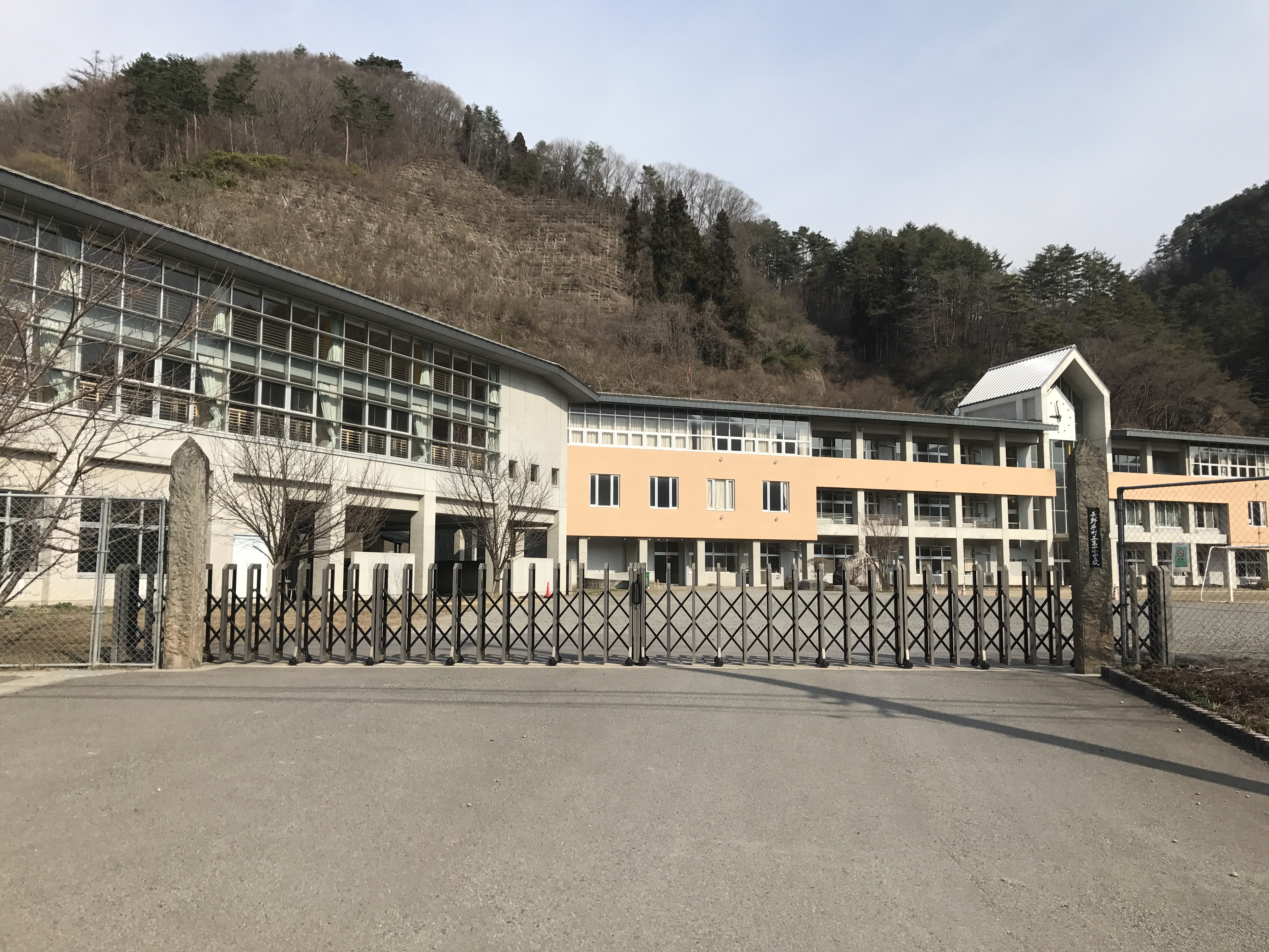 長野原町立第一小学校の校門と校舎